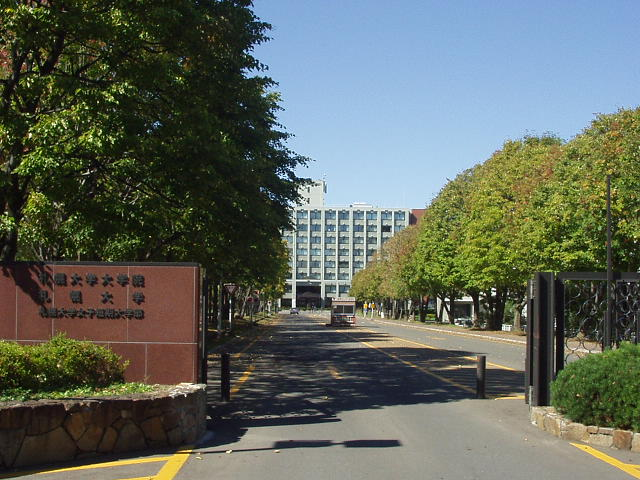 札幌大学正門。撮影位置: 北海道、札幌市、豊平区、西岡4条7丁目。水源地通から西向き。